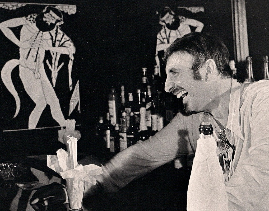 Porträt René Durand, ehemaliger Betreiber des Nachtlokals Salambo in HH-St.Pauli